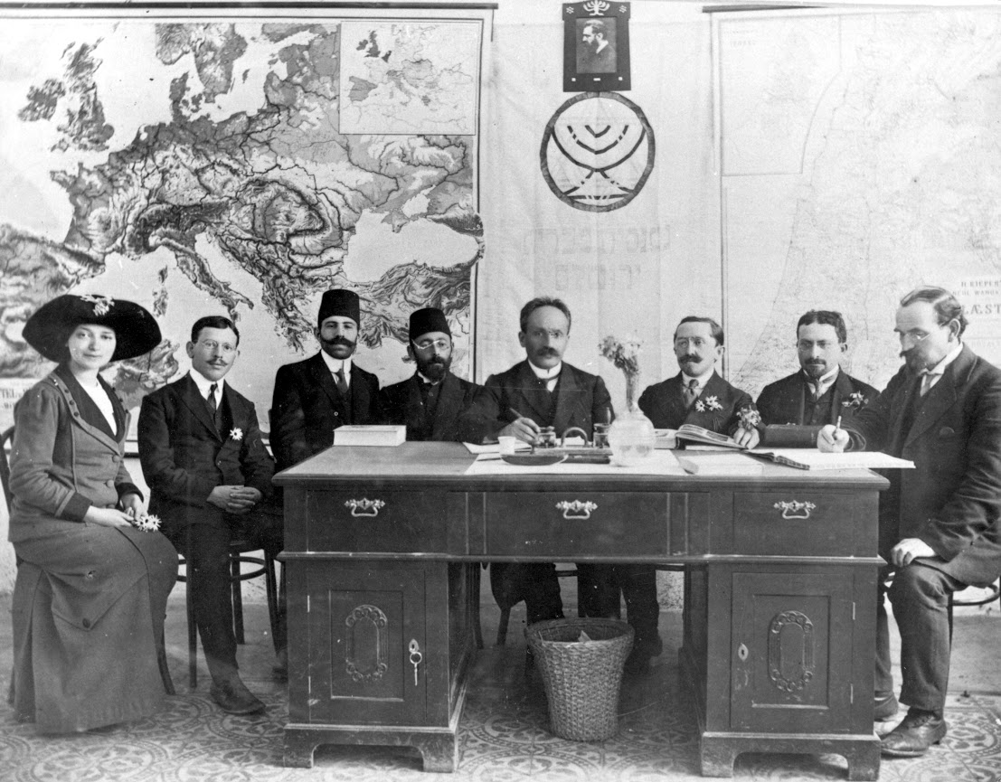 (1913) משמאל לימין: שולמית קלוגאי, נ. ירושלמי, א. חבובא, י. הלבץ, ש. שילר, י. איתן, דר'. נ. חכם, י.יעקובי, ברקע מפה ותמונת הרצל.